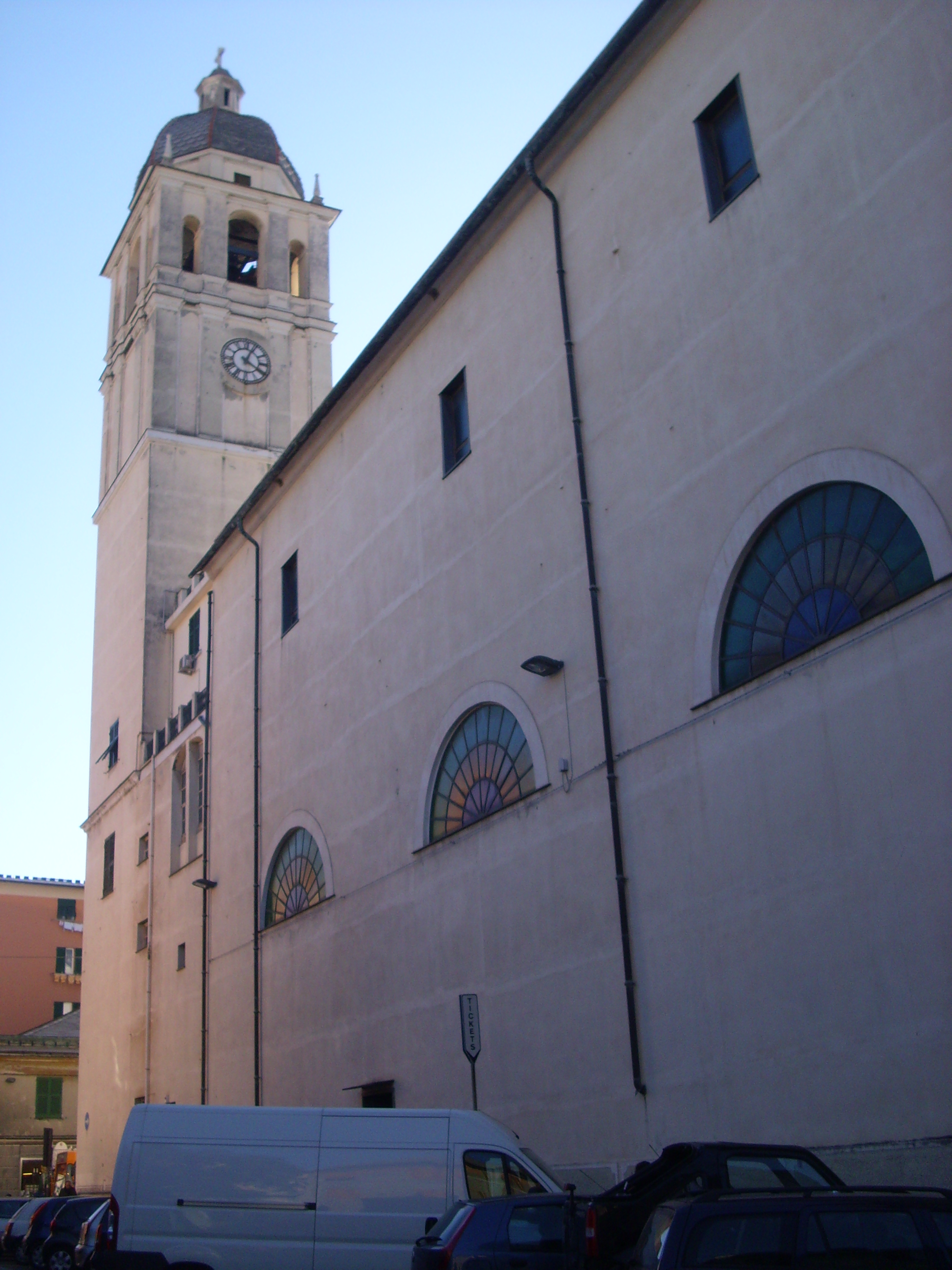 Campanile e lato della Basilica di Nostra Signora dell'Assunta a Genova Sestri Ponente